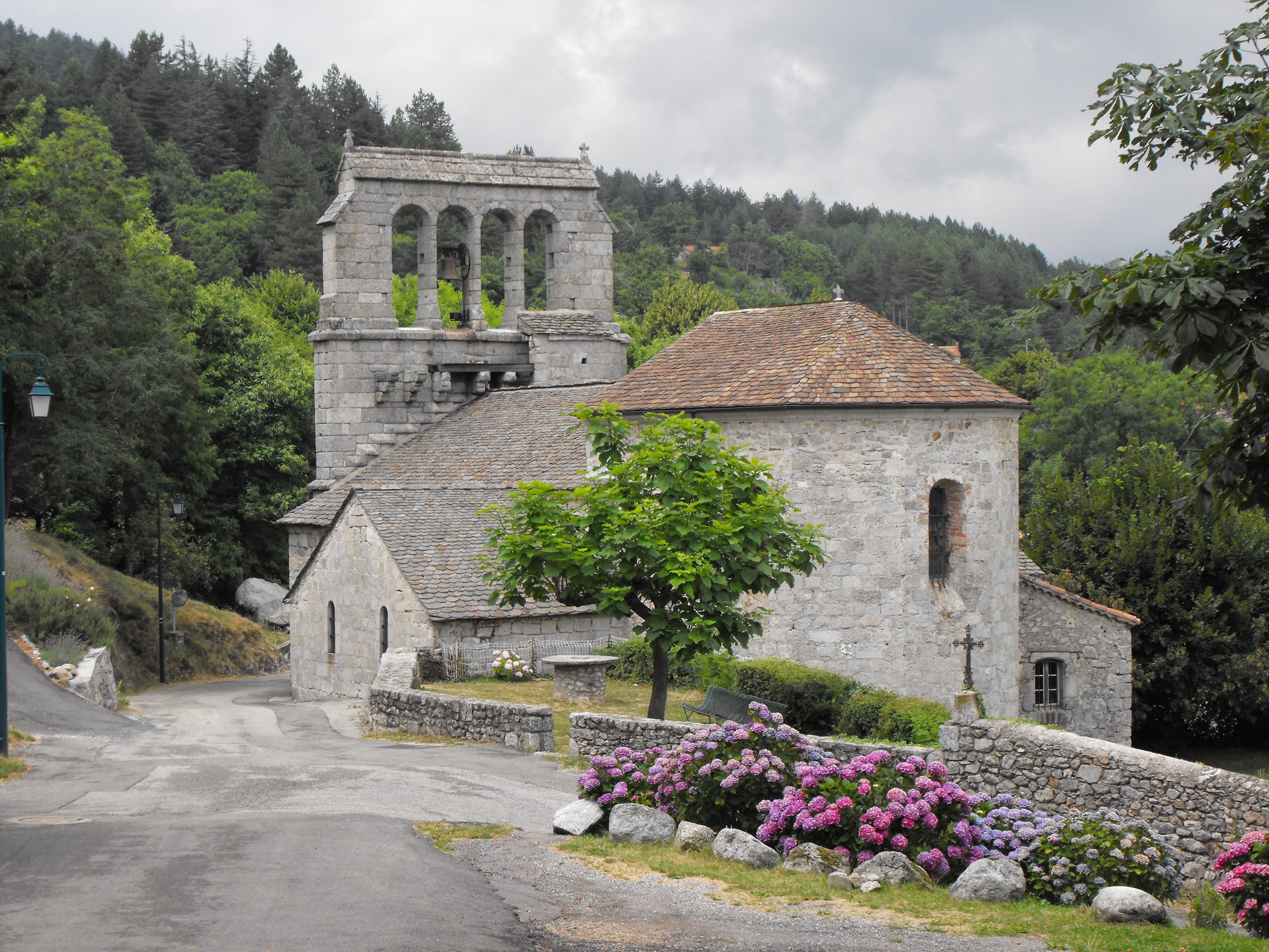 l'église et son clocher à peigne